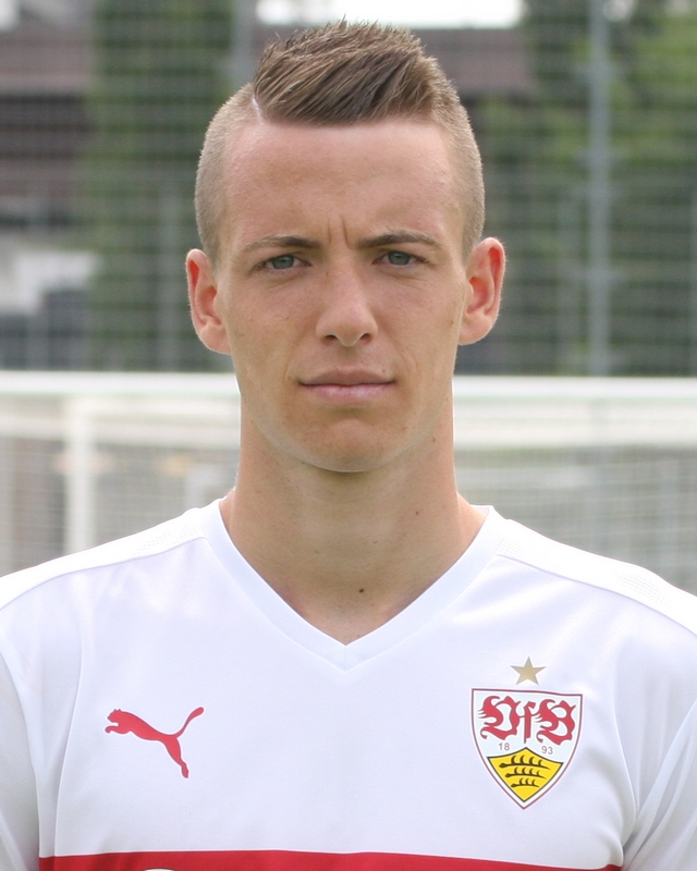 Max Besuschkow beim offiziellen Fotoshooting VfB II. Bild von